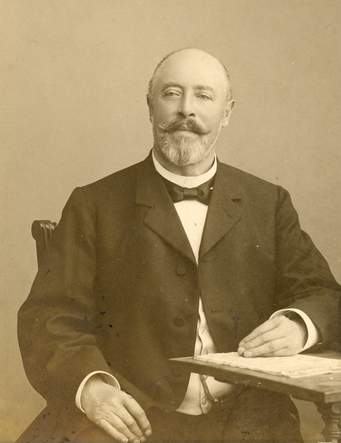 Porträtfotografie von (Adolph) Wilhelm Krasnapolsky